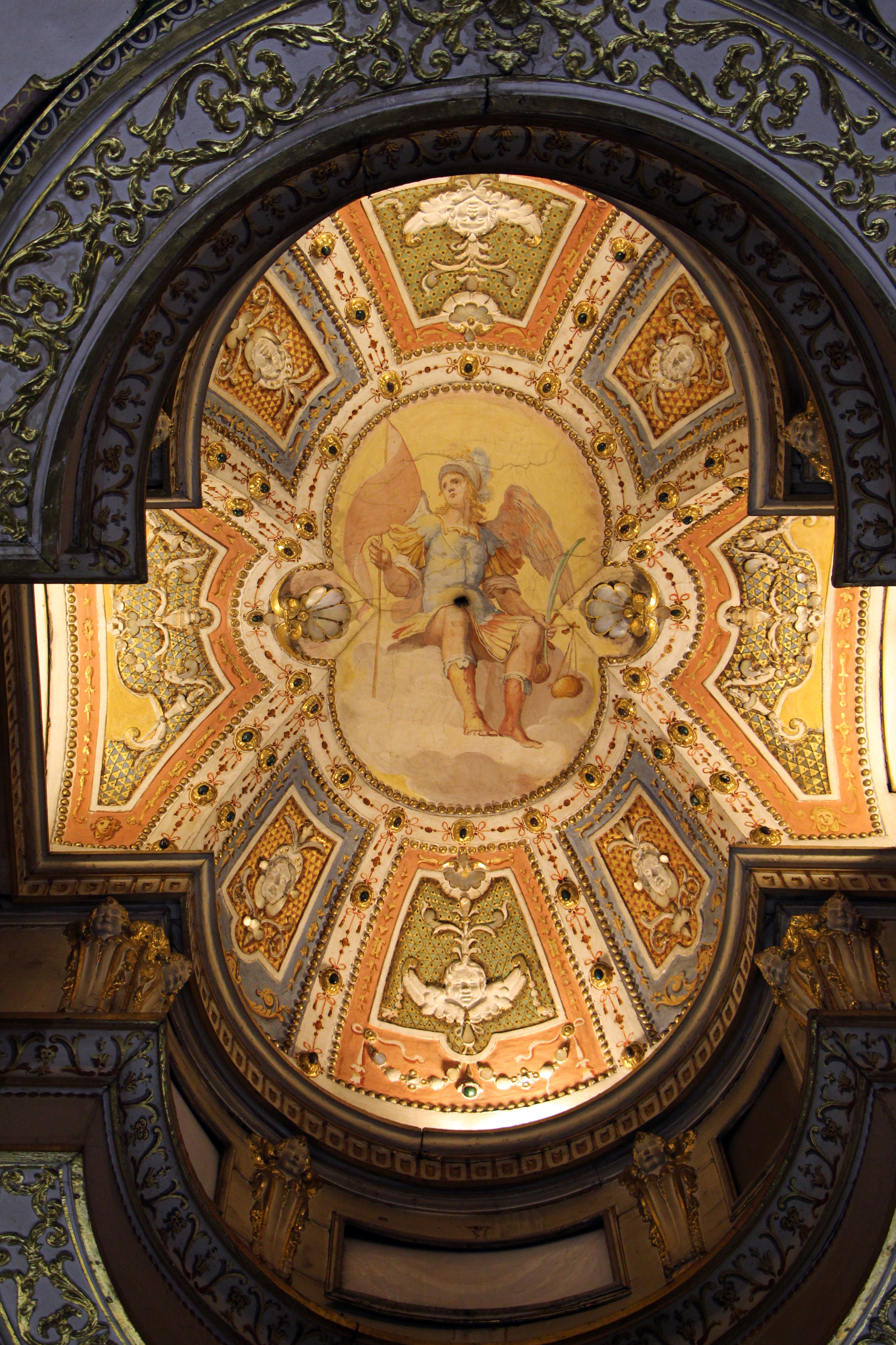 Casa Buonarroti - Camera degli Angioli